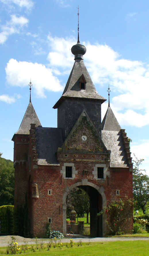 Poortgebouw commanderij Sint-Pieters-Voeren